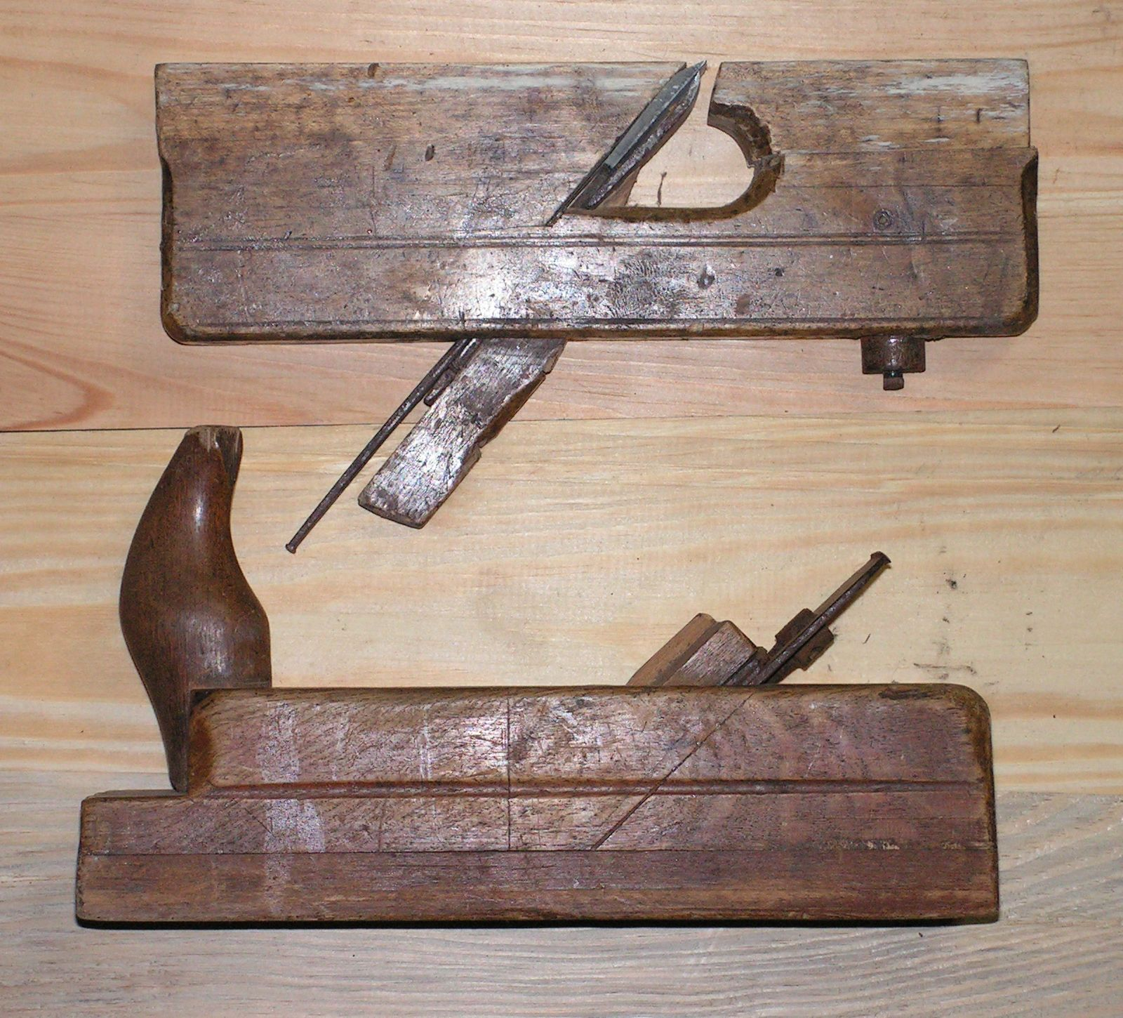 Zdjęcie przedstawia narzędzia stolarskie z grupy: do wyrównywania powierzchni. Na zdjęciu od góry: strug kątnik, strug gładzik.